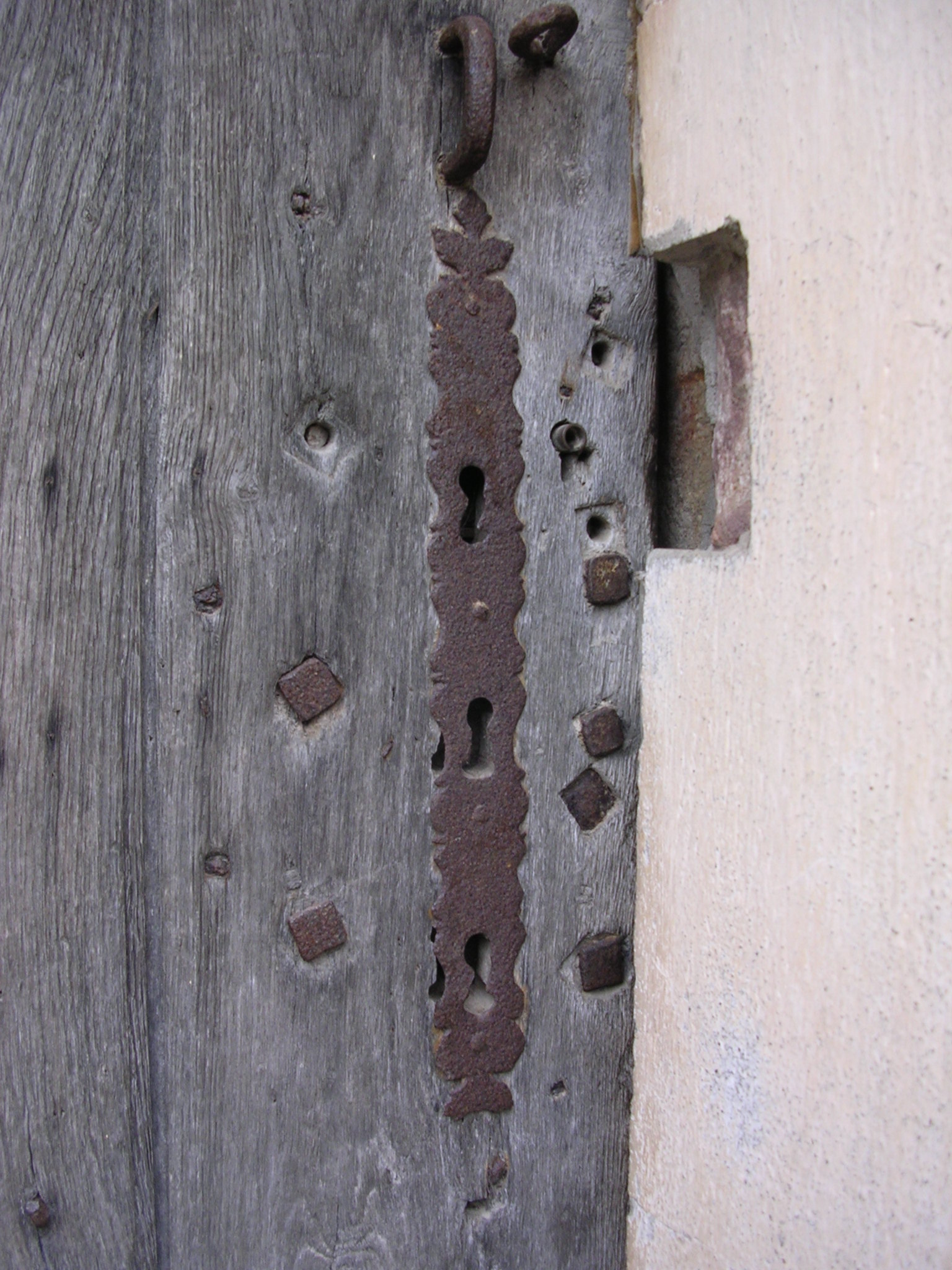 La serrure à trois clés du grenier à sel de Sainte-Suzanne (mayenne) 1725